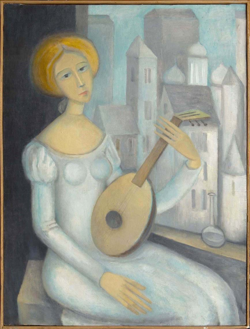 Устюгов 1975 Девушка с лютней